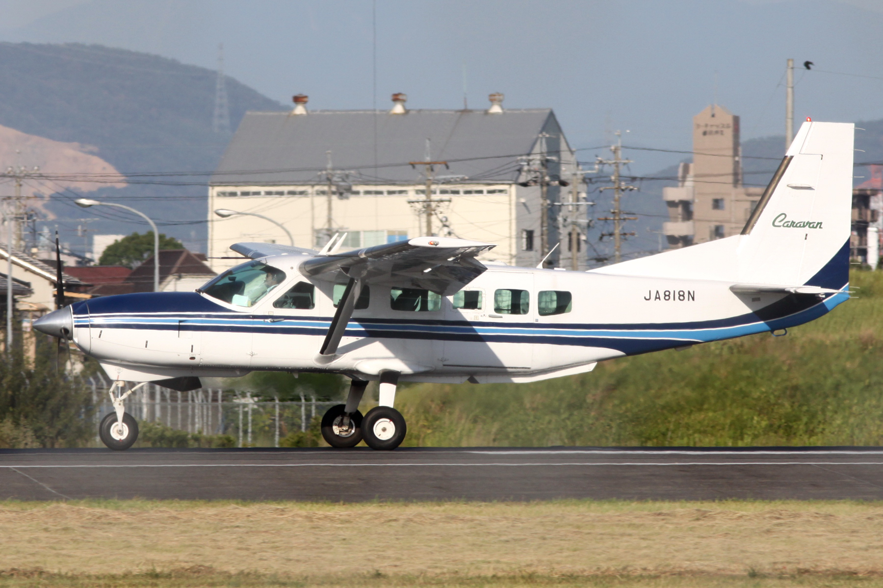 Runway 34, Nagoya Airfield